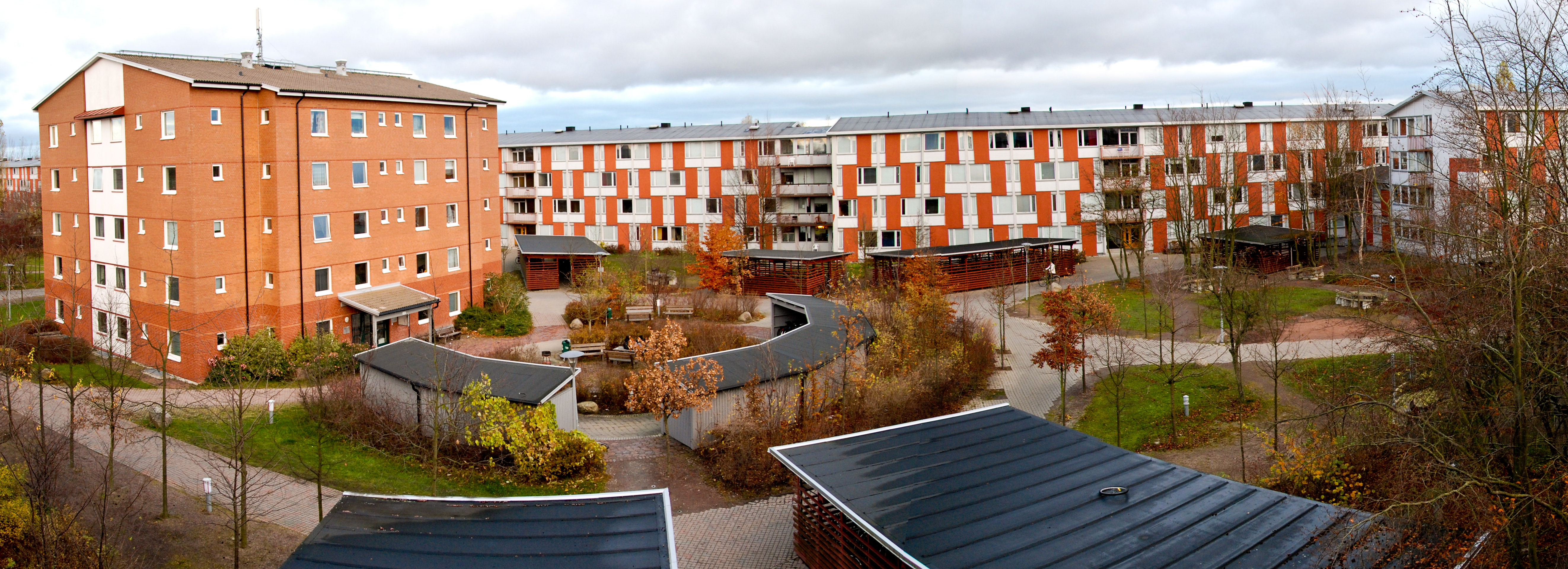 Panorama-vy över Delphi studentområde, hösten 2007. Tagit från hus K, våning 4.